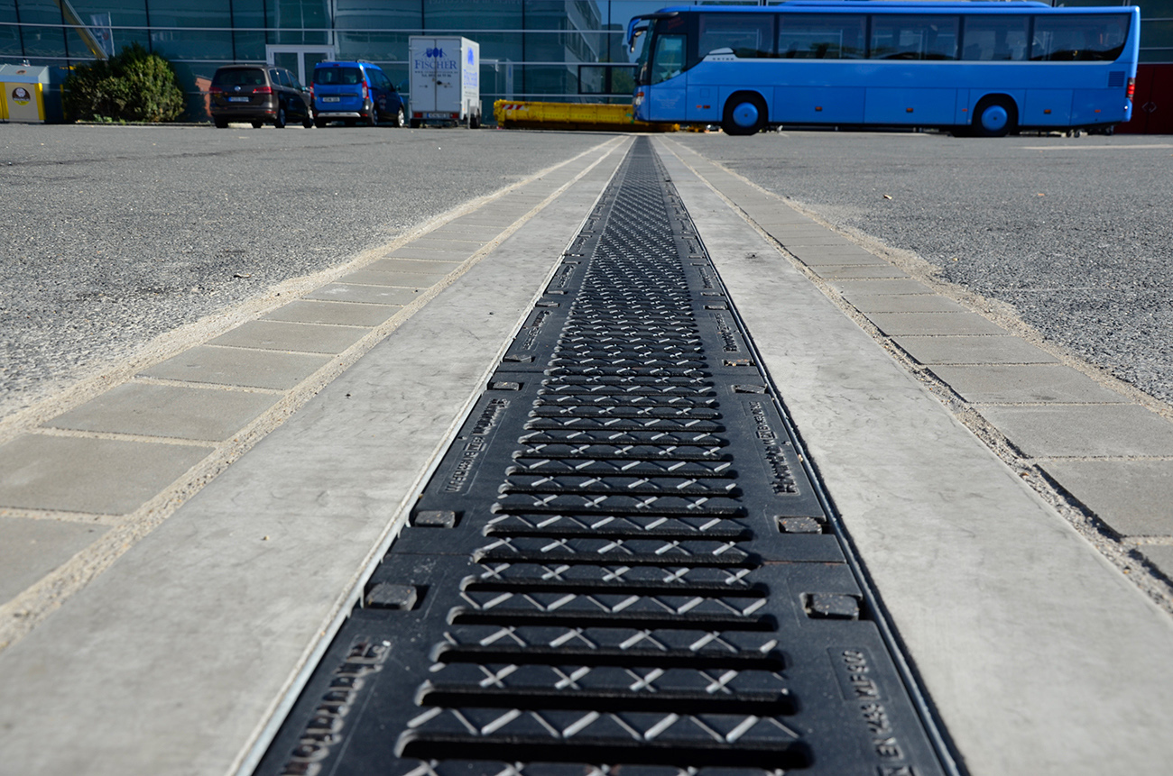 Eingebaute Rinne von HAURATON